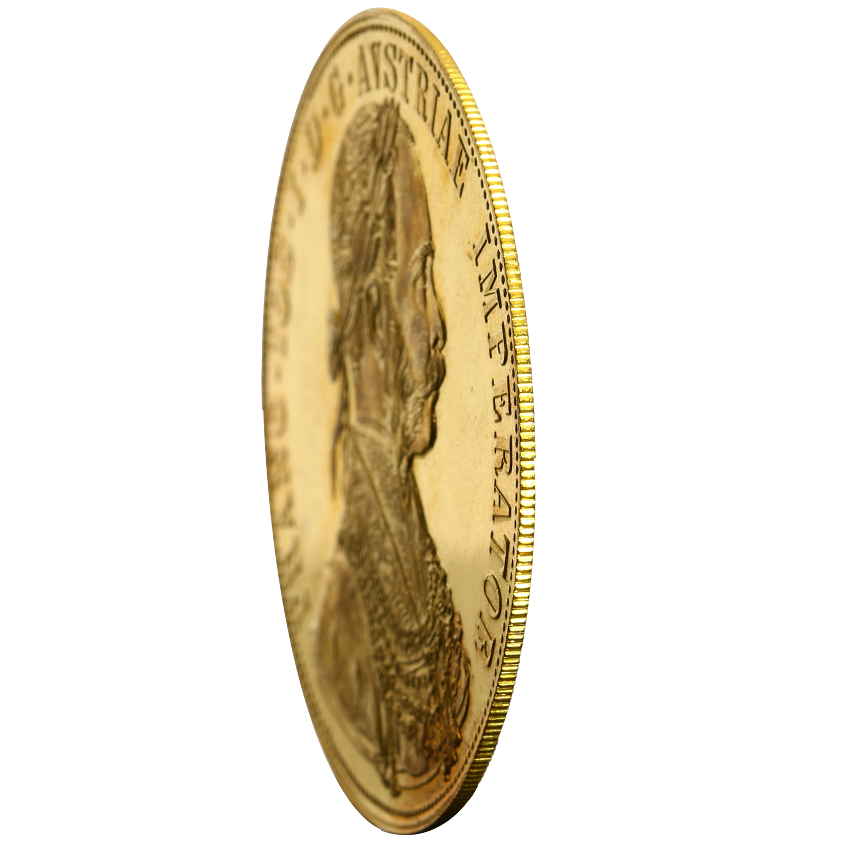 Randseite österreichischer 4-facher Golddukat